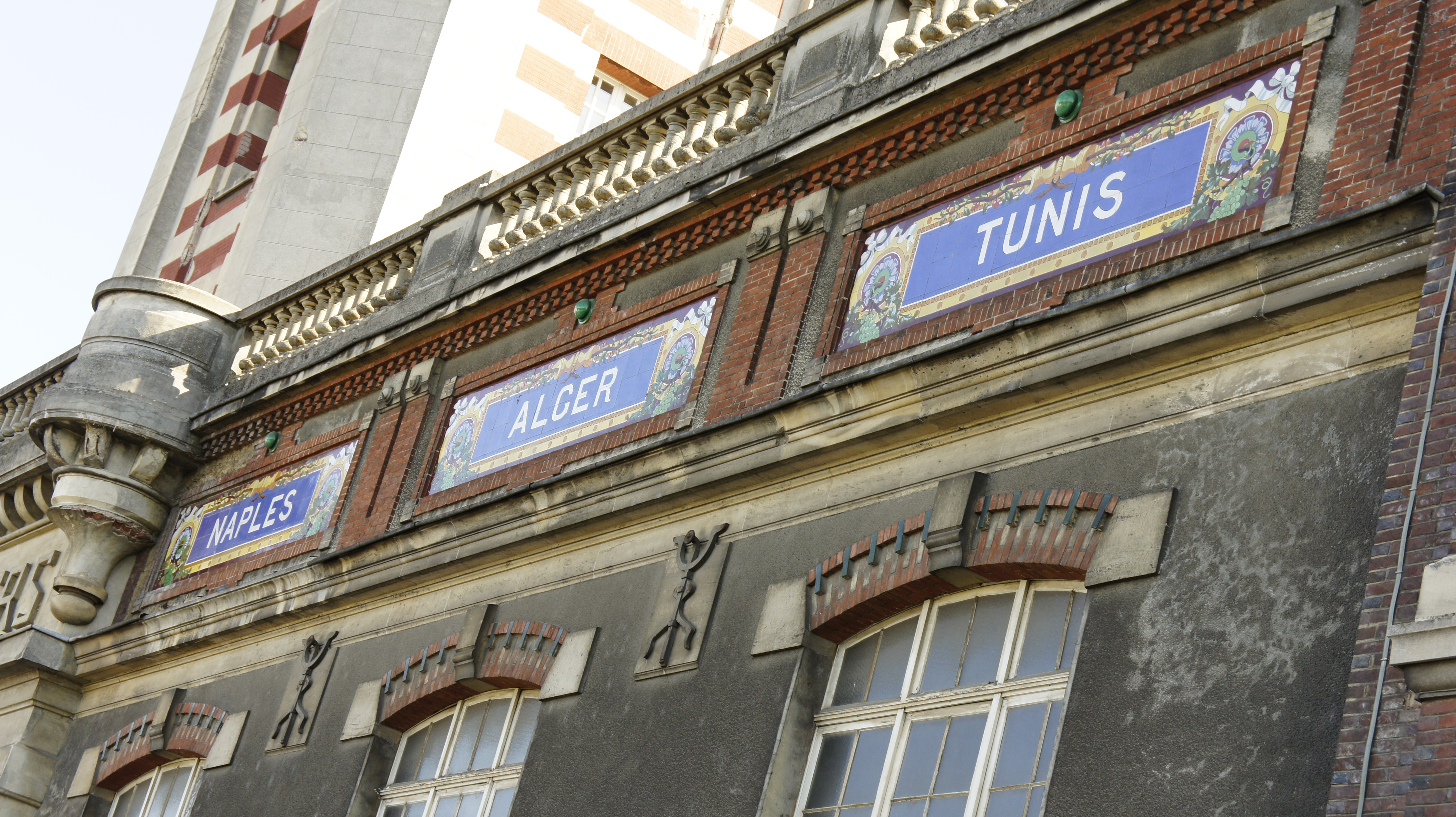 Une vue sur les bâtiments de Castellane .